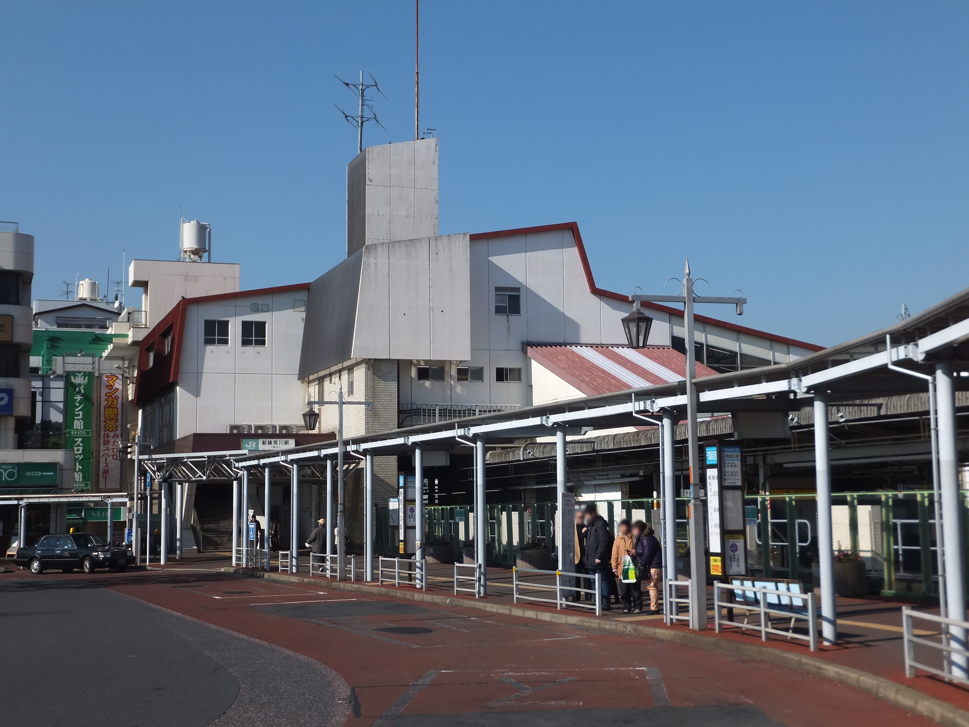 総武本線新検見川駅（千葉市花見川区）、南口